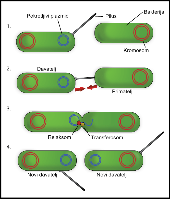 Kroatizirana verzija slike o konjugaciji bakterija